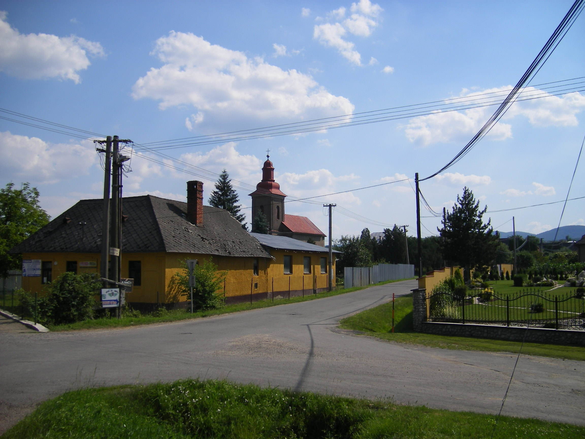 Čaklov, okres Vranov nad Topľou